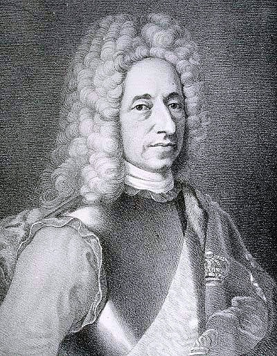 Frederik IV of Denmark